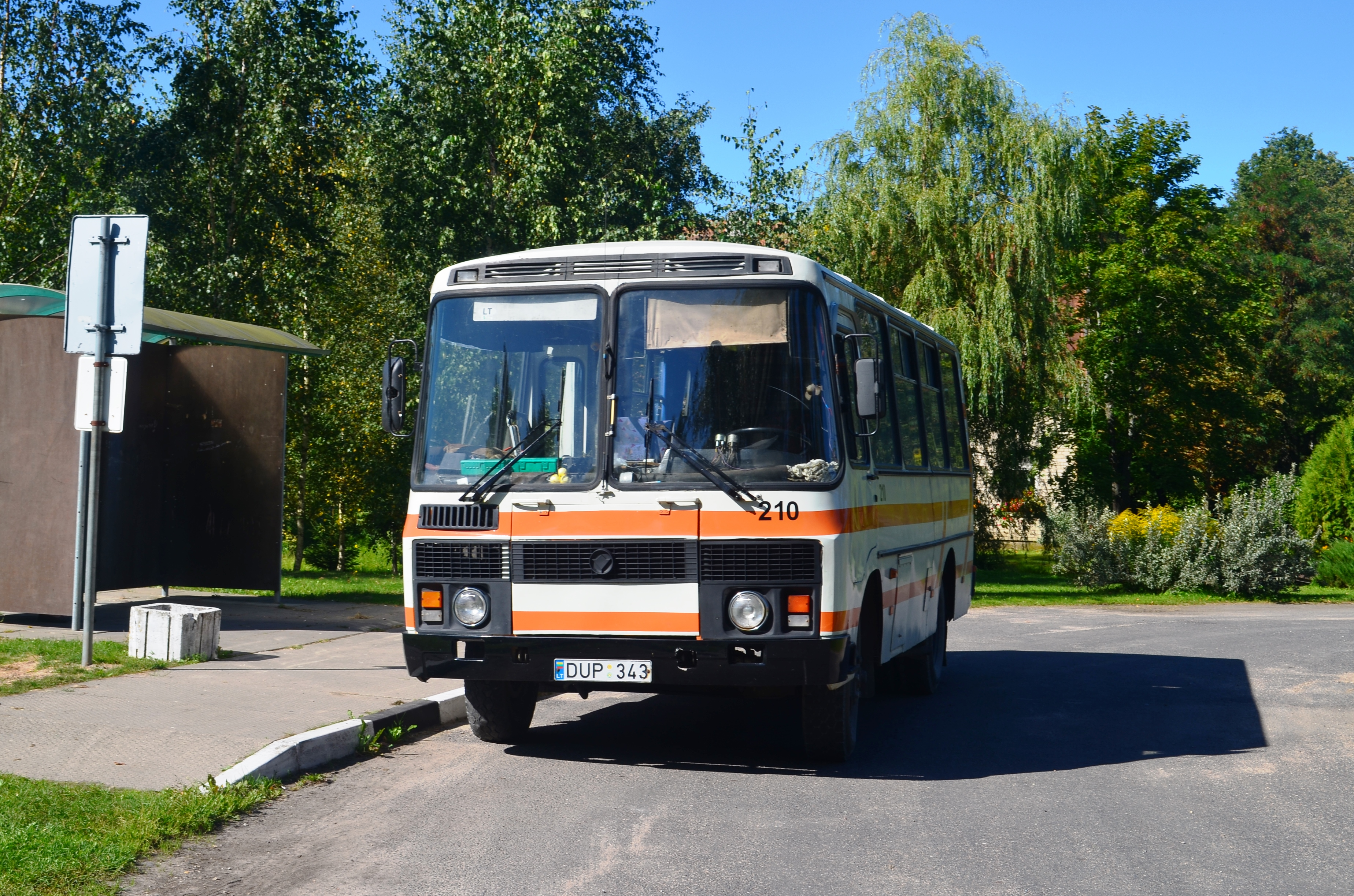 PAZ 3205, Antazavė, Zarasų raj.